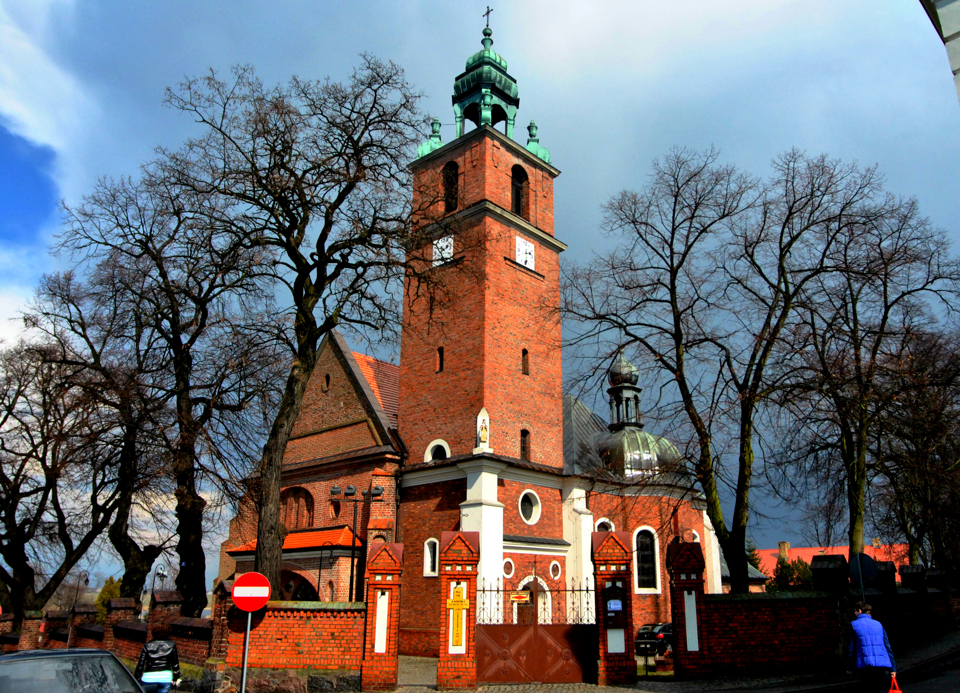 Kościół w Kłecku